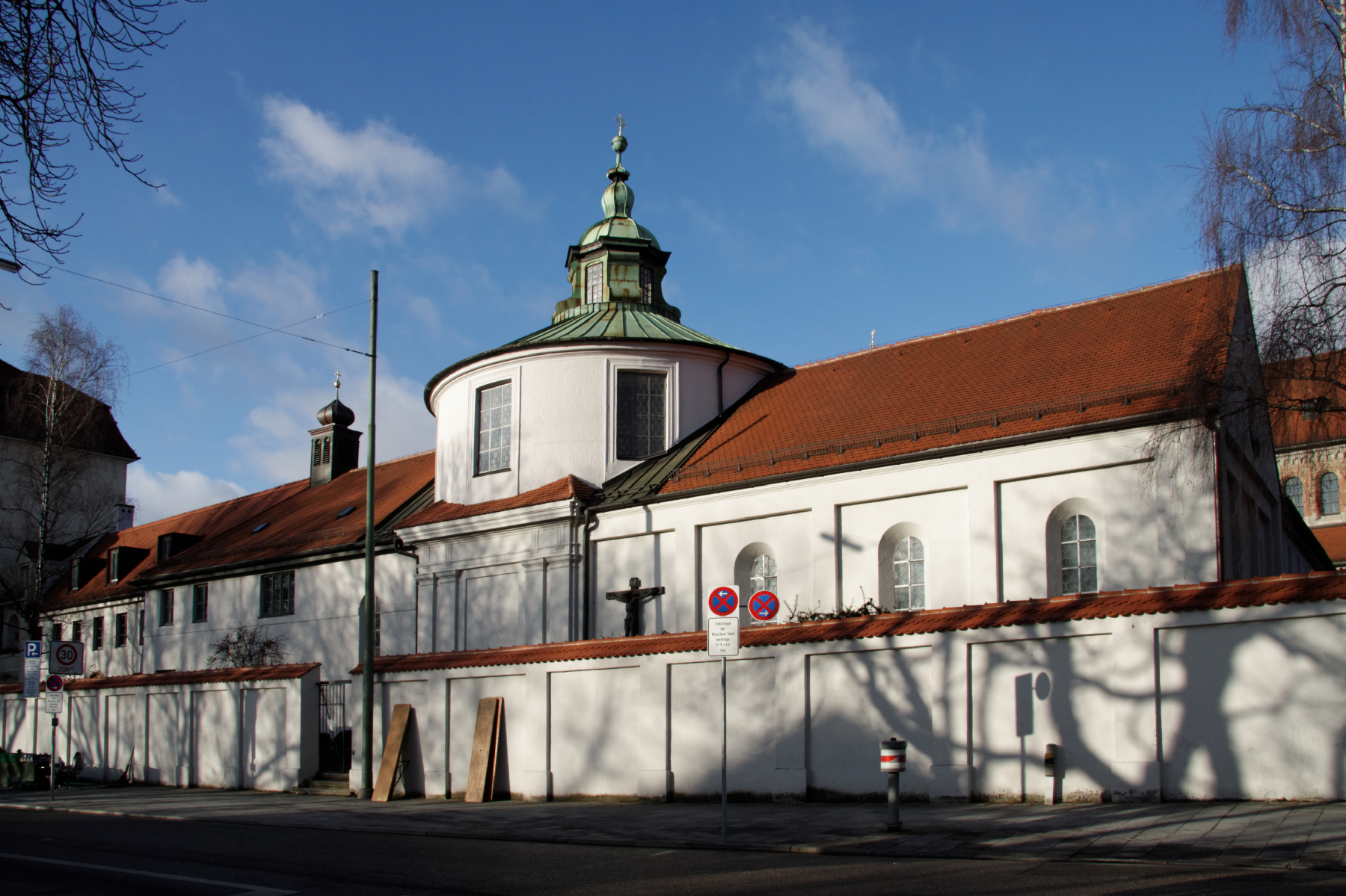 München, Schmerzhafte Kapelle